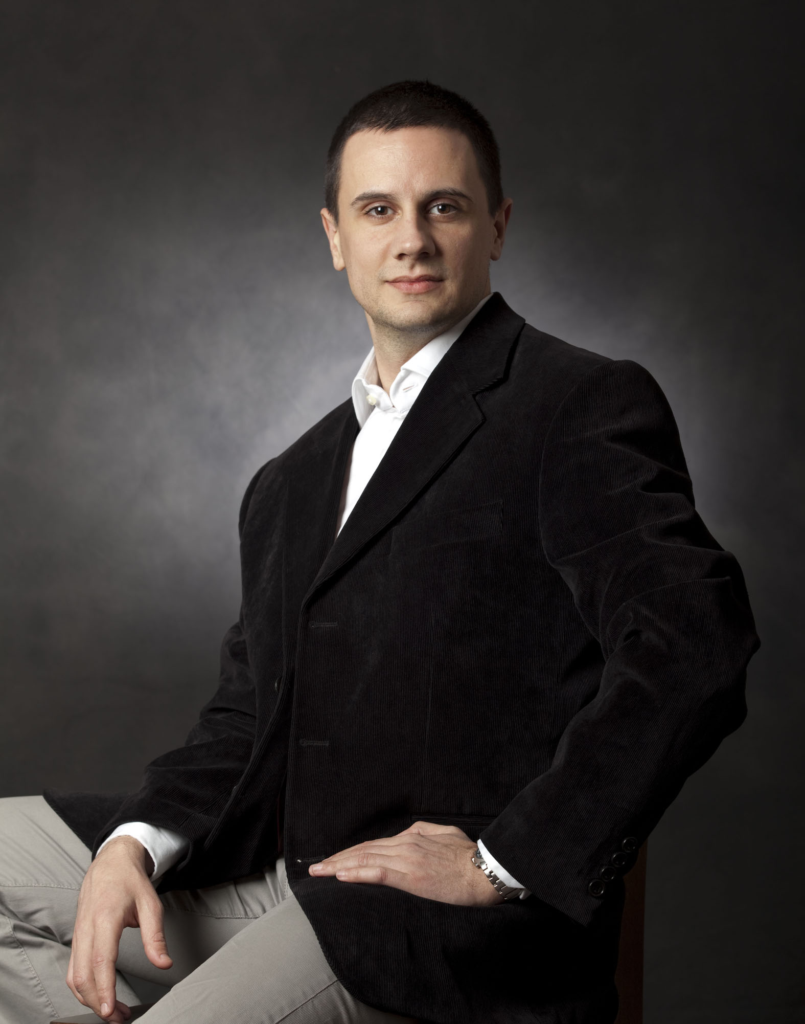 Ђорђе Алфиревић portrait